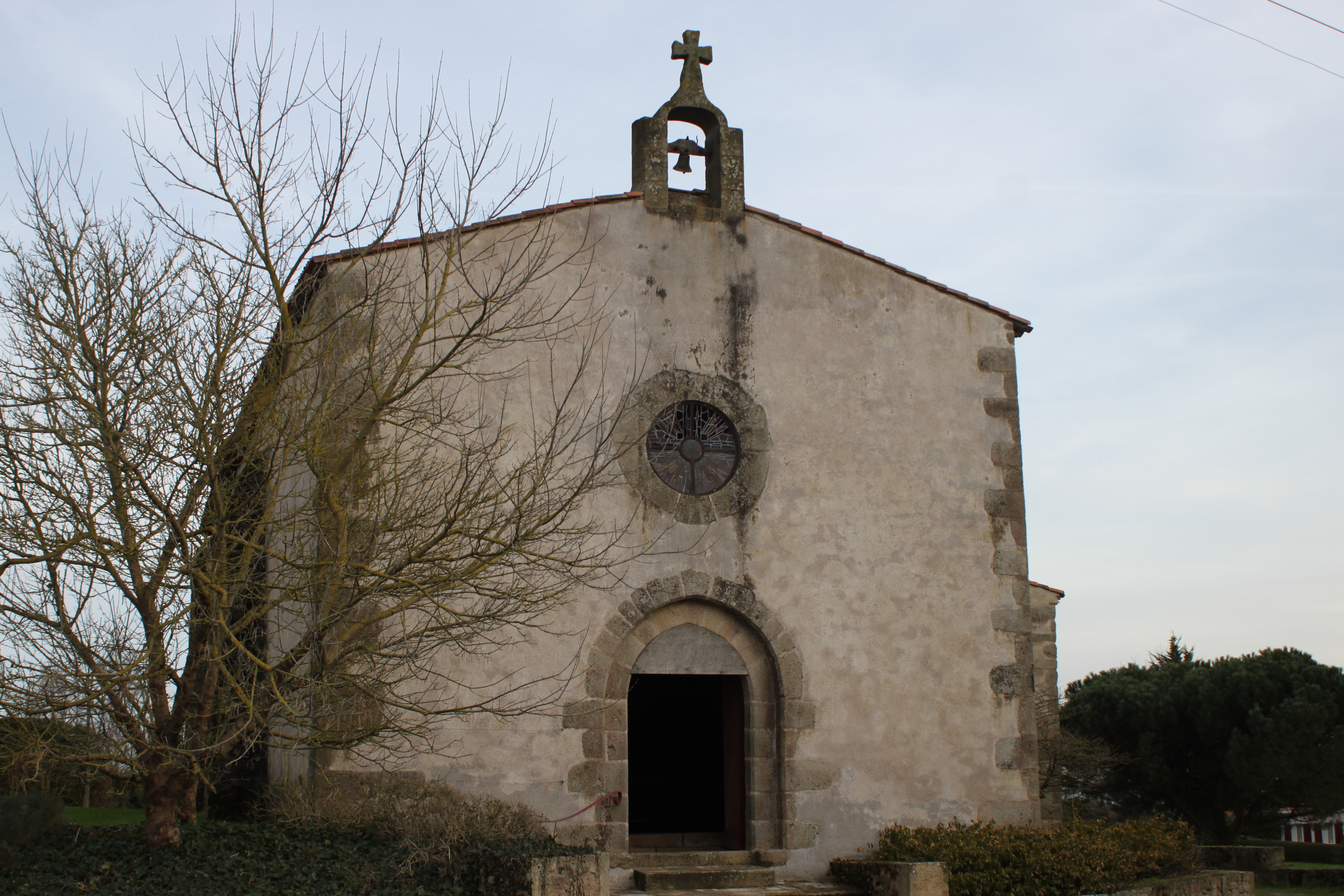 Chapelle Saint-Lazare (XIII°), par Guy de Thouars, ancienne léproserie, Fr-85-Mortagne-sur-Sèvre.